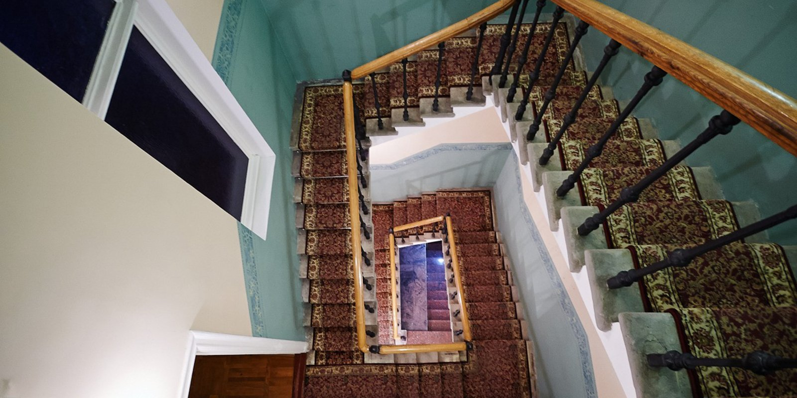 Мраморная парадная лестница в интерьере московской городской усадьбы Прохоровых-Хлудовых в Подсосенском переулке, 30. XVIII-XIX вв.